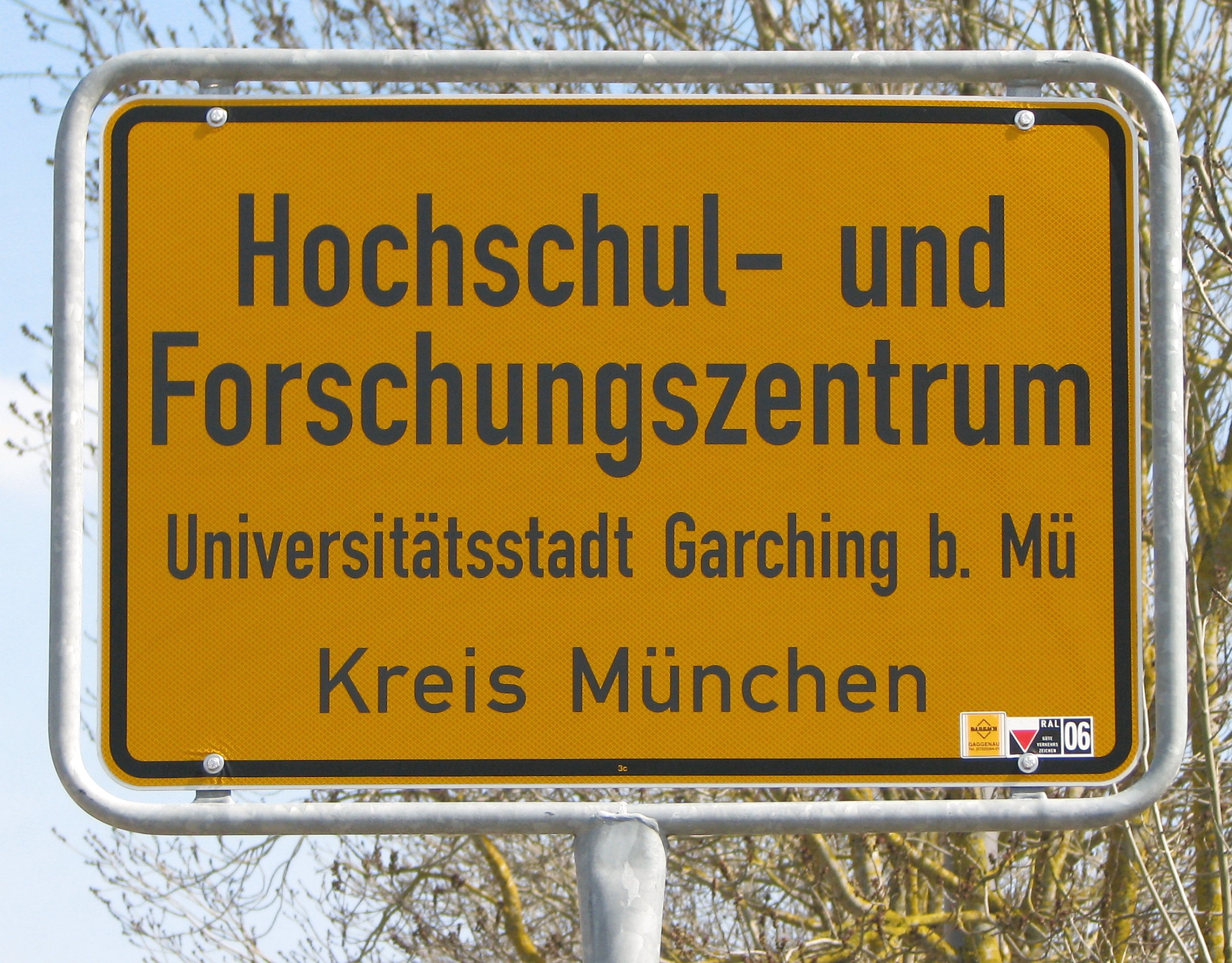 Amtliche Ortstafel zweitrang Ortsbezug auch gültig nach StVO Hochschul- und Forschungszentrum Garching TUM Foto Wolfgang Pehlemann IMG_1635